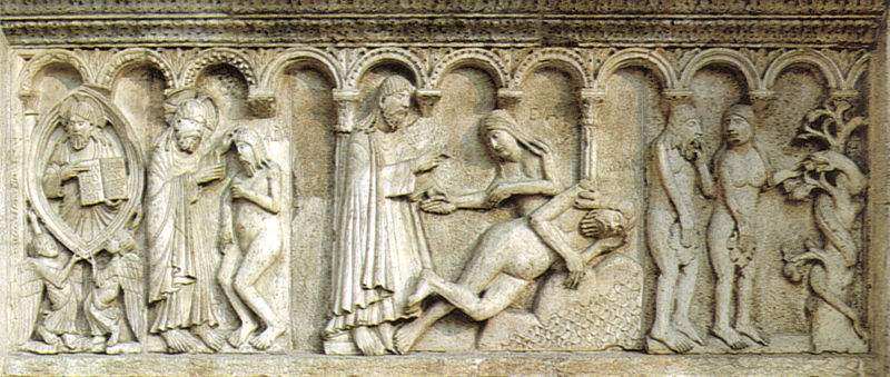 Bajorrelieve de Wiligelmo: la Creación del hombre, de la mujer y el pecado original. Catedral de Módena (Italia)